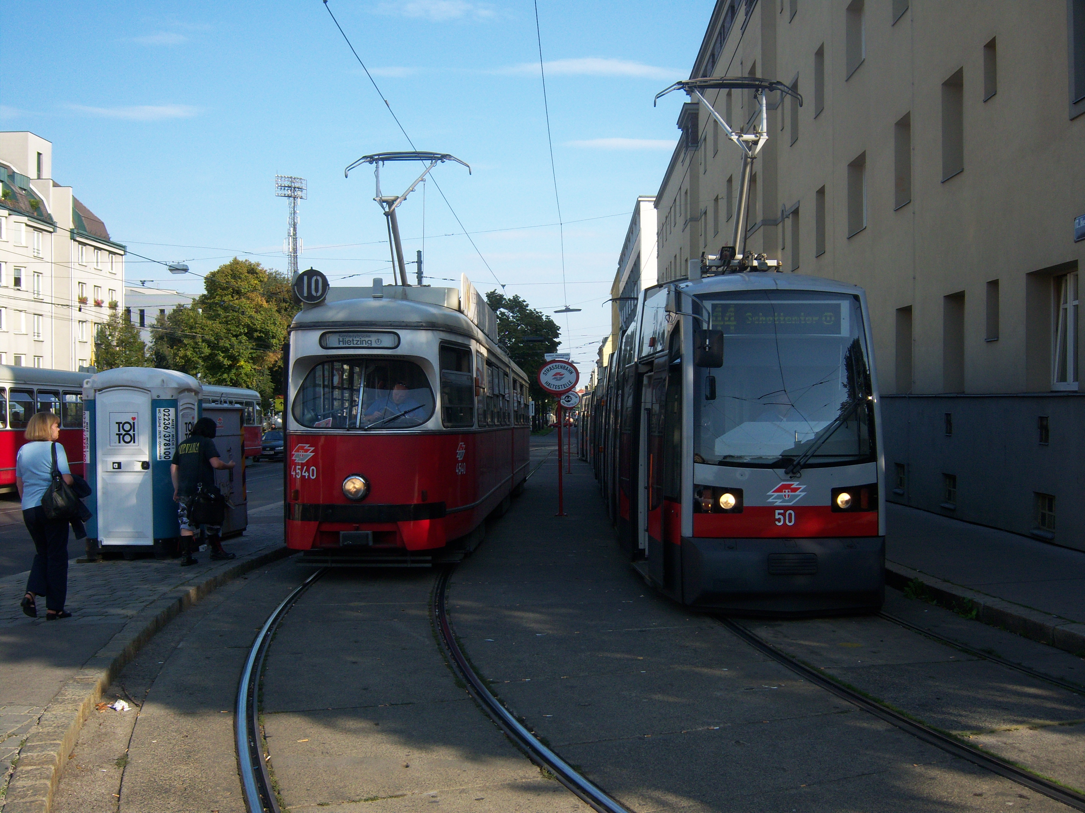 Endstelle Dornbach, Güpferlingstraße der Linien 10 und 44